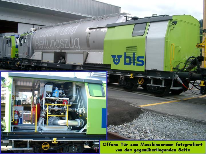 Lösch^und Rettungszug der BLS: Tanklöschwagen mit Maschinenraum